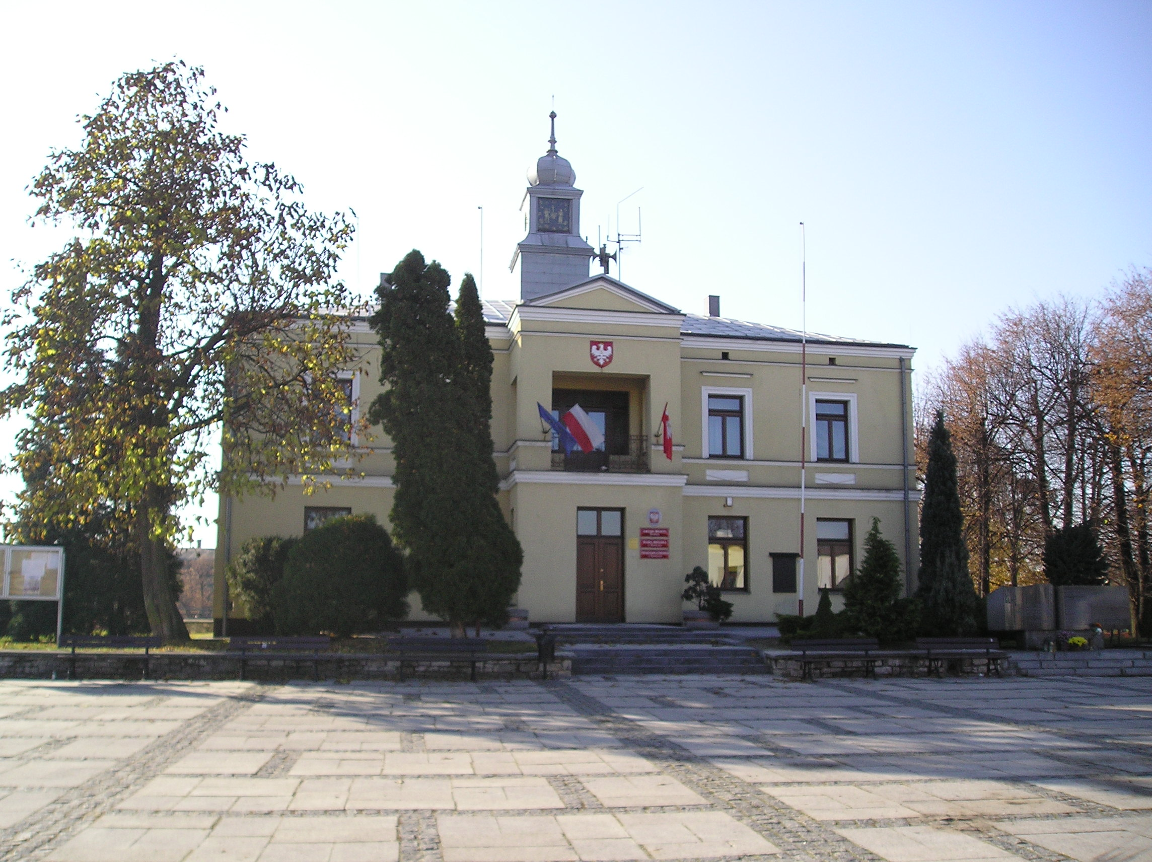 Ratusz w Sławkowie (woj. śląskie)